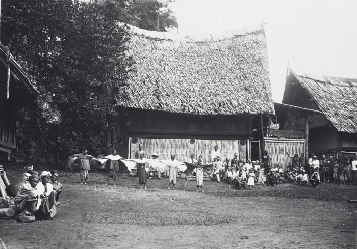 Foto. Op de voorgrond liggen koffiebonen te drogen.. Dansvoorstelling in een dorp op het Pasemah-plateau tijdens een bezoek van Europeanen